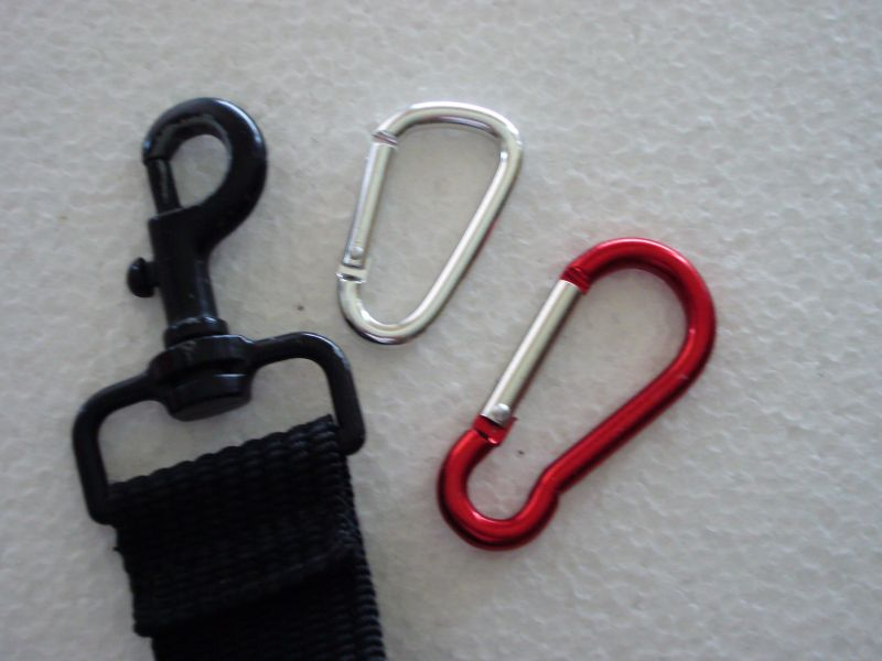 Musketonhaak en twee karabijnhaken, eigen foto Caseman juni 2006